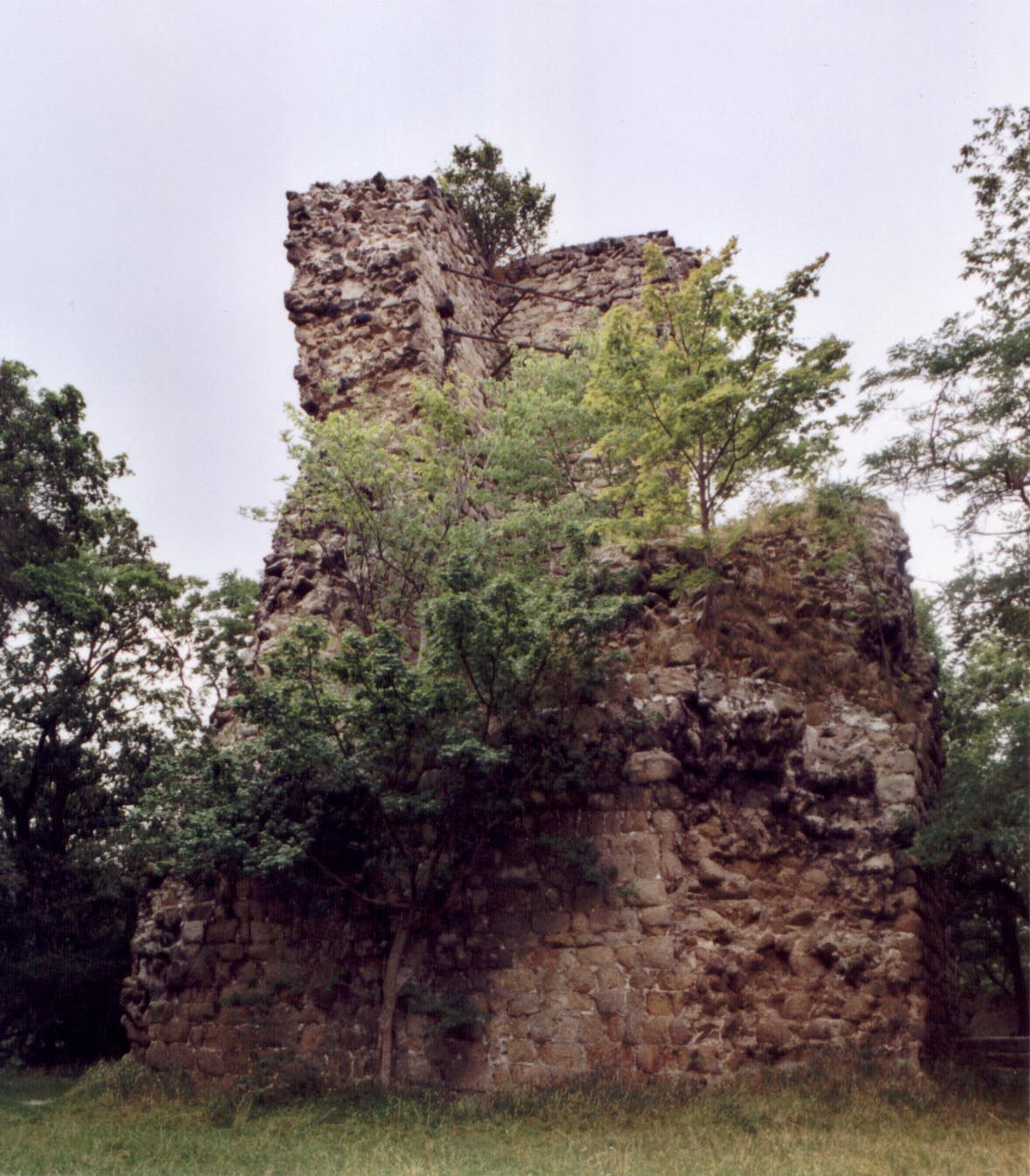 Kleine Lauenburg, Ostseite des Bergfrieds